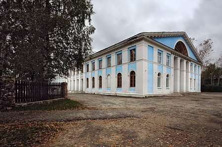 районный Дом культуры